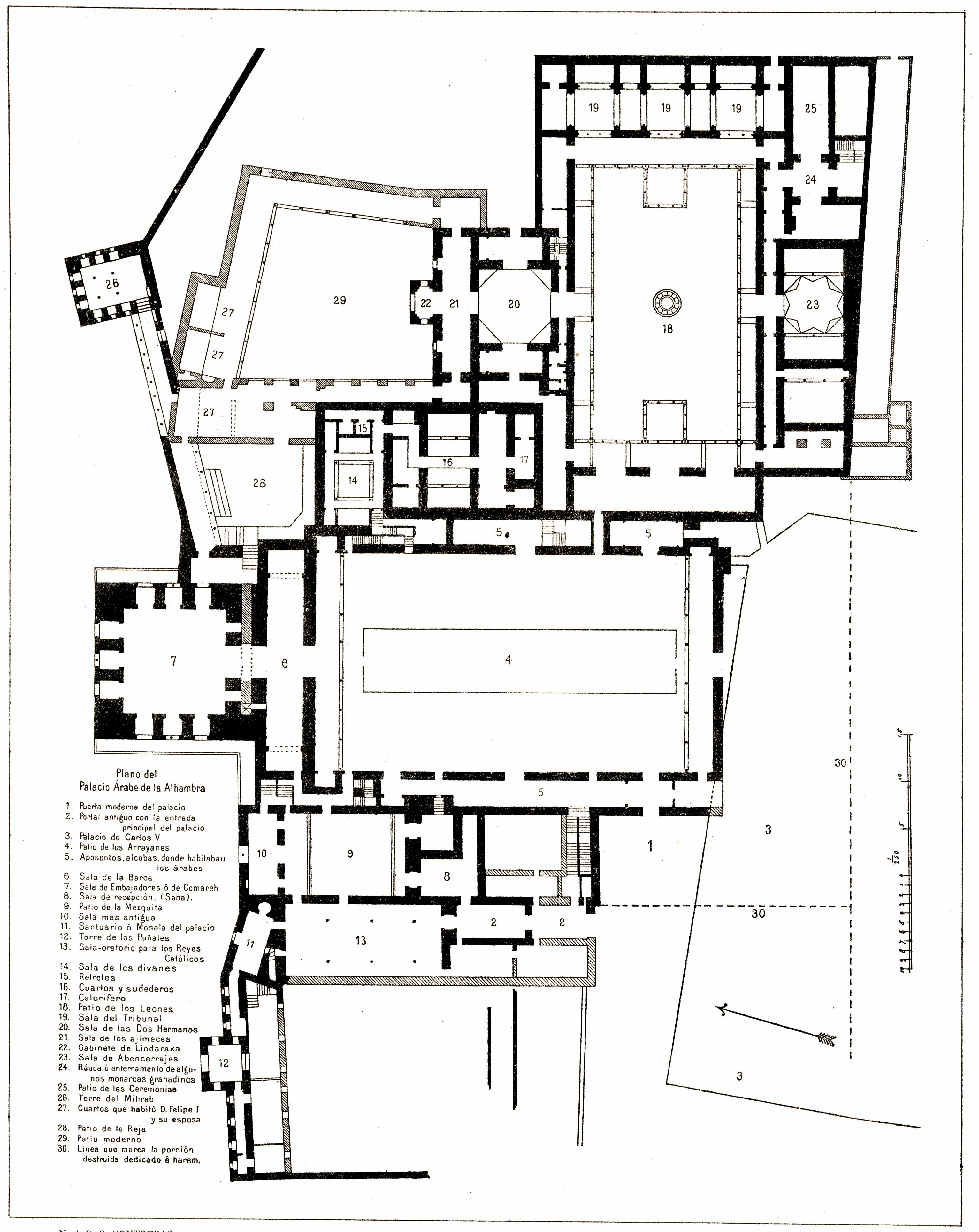 Constantin Uhde, Baudenkmäler in Spanien und Portugal. Aufnahmen einer Reise 1888-1889 Berlin, Verlag von Ernst Wasmuth 1892